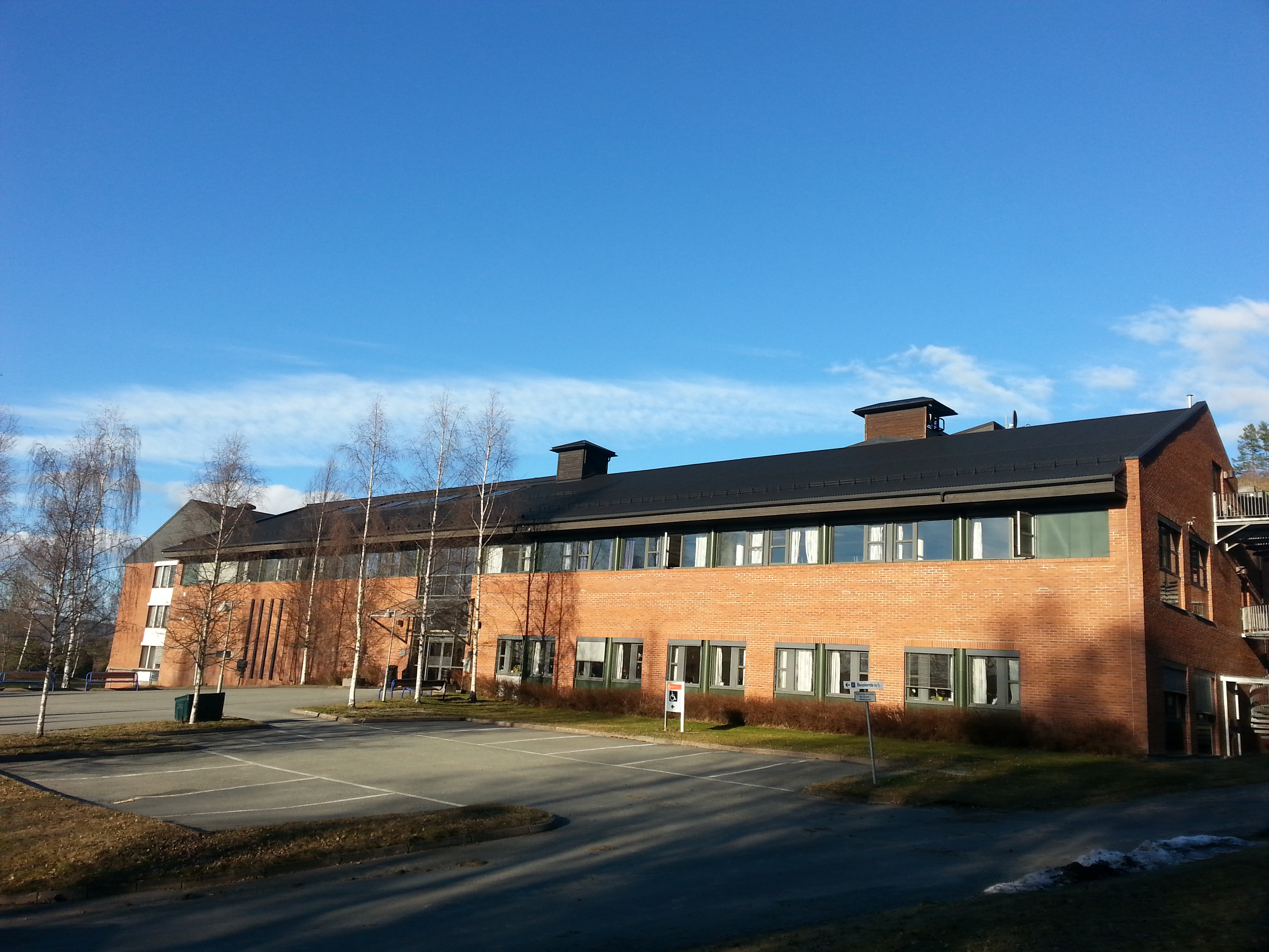 Høgskolen i Buskerud og Vestfold - campus Hønefoss.